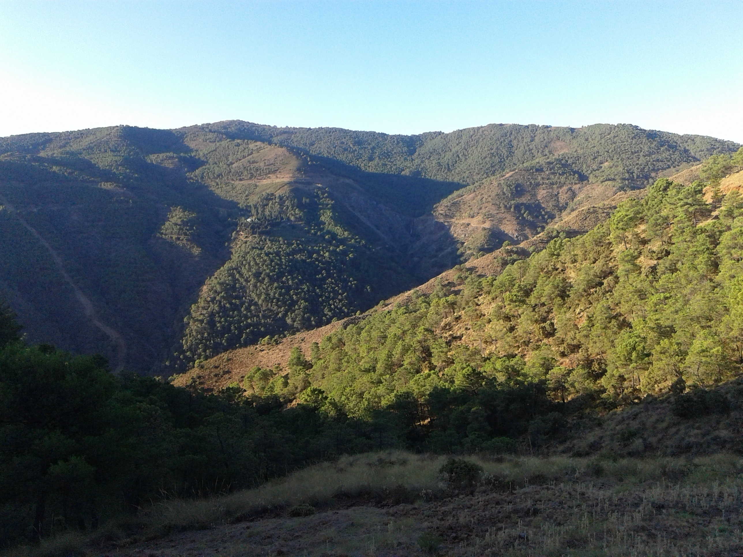 Sierra Parda de Tolox y Pico Aranda desde el camino Tolox-Puerto de las Golondrinas